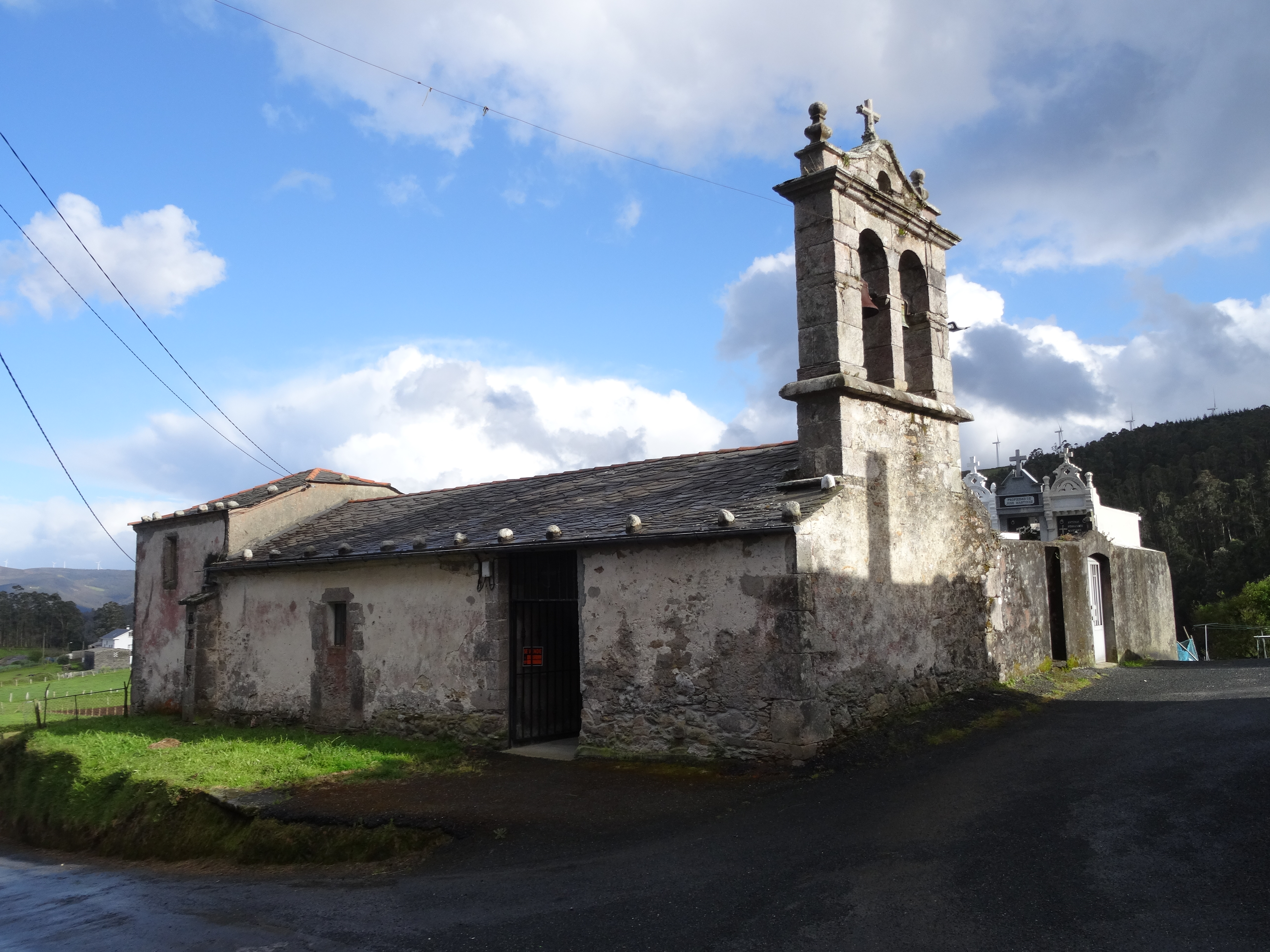 Ver título.